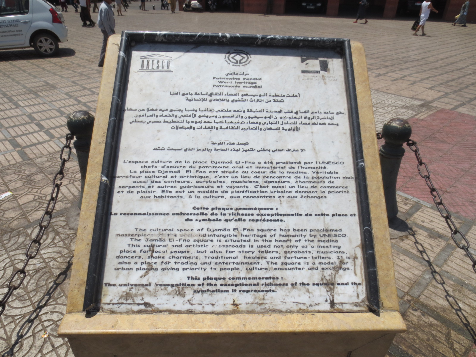 Jamaa El Fna